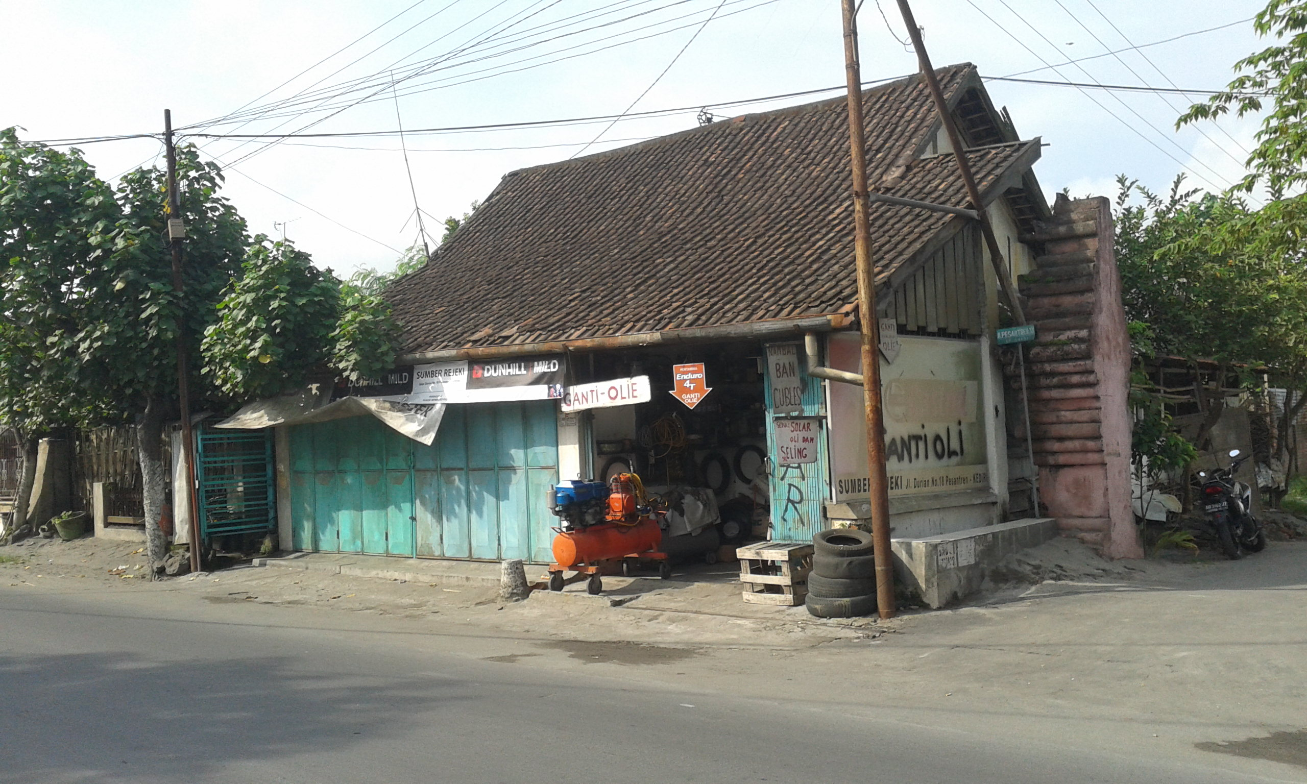 Sejarah perkeretaapian Indonesia